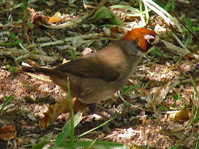 Pinzón Cafetalero Melozone biarcuata